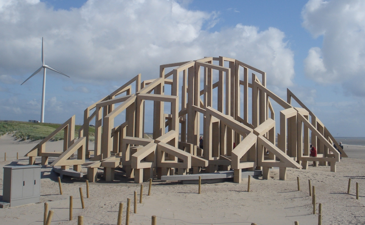 Rotterdam, 2e Maasvlakte. Kunstwerk "Zandwacht" van kunstenaarsgroep Observatorium. 2015.